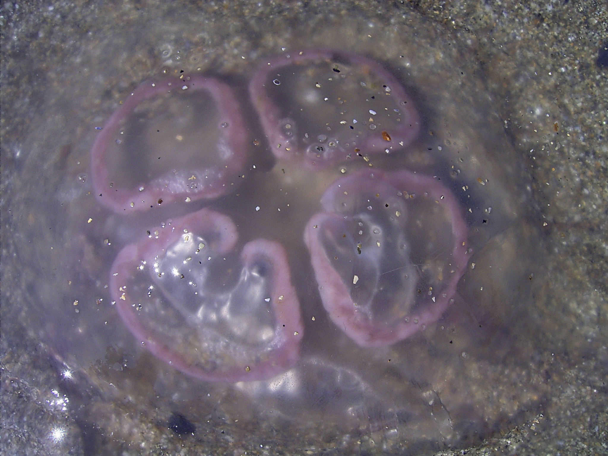 Gonades Aurelia aurita